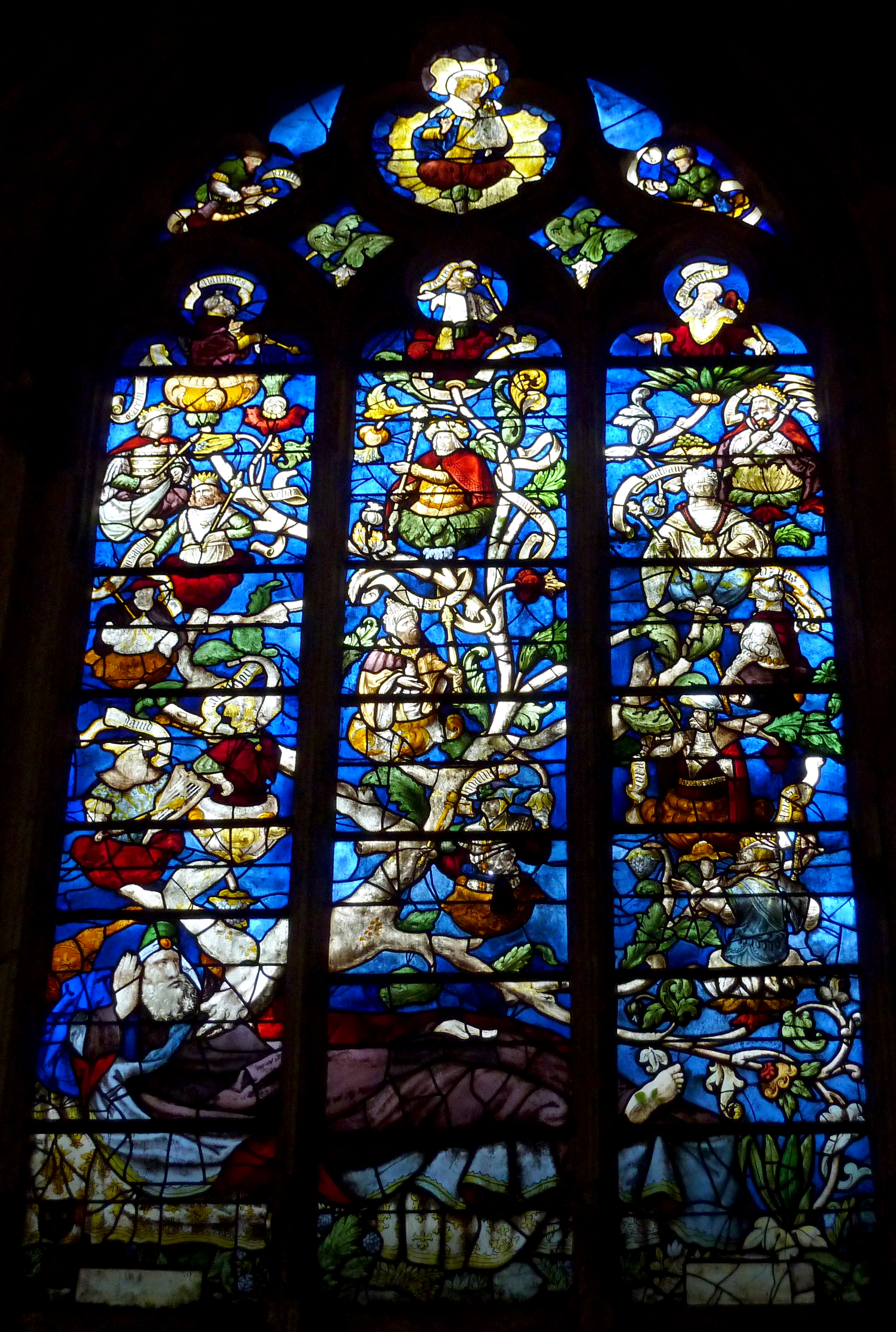 Katholische Pfarrkirche Saint-Martin in Herblay, einer Gemeinde im Département Val d'Oise (Île de France), Bleiglasfenster aus dem 16. Jh. mit der Darstellung der Wurzel Jesse